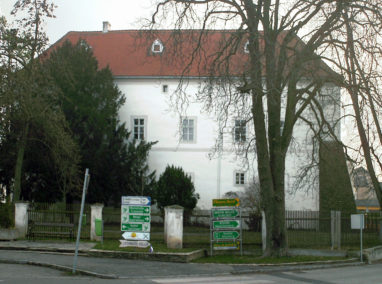 Stadtschloß von Traismauer/NÖ.